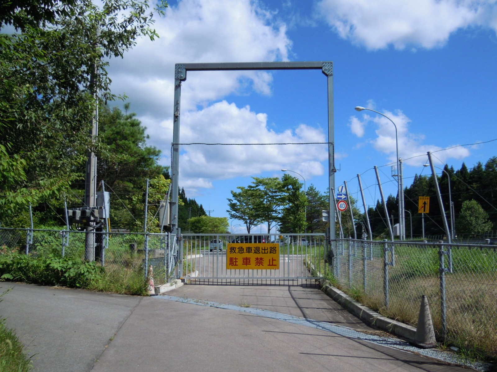 秋田市の秋田自動車道太平山パーキングエリア（上り線）にある救急車緊急退出路を一般道側から。